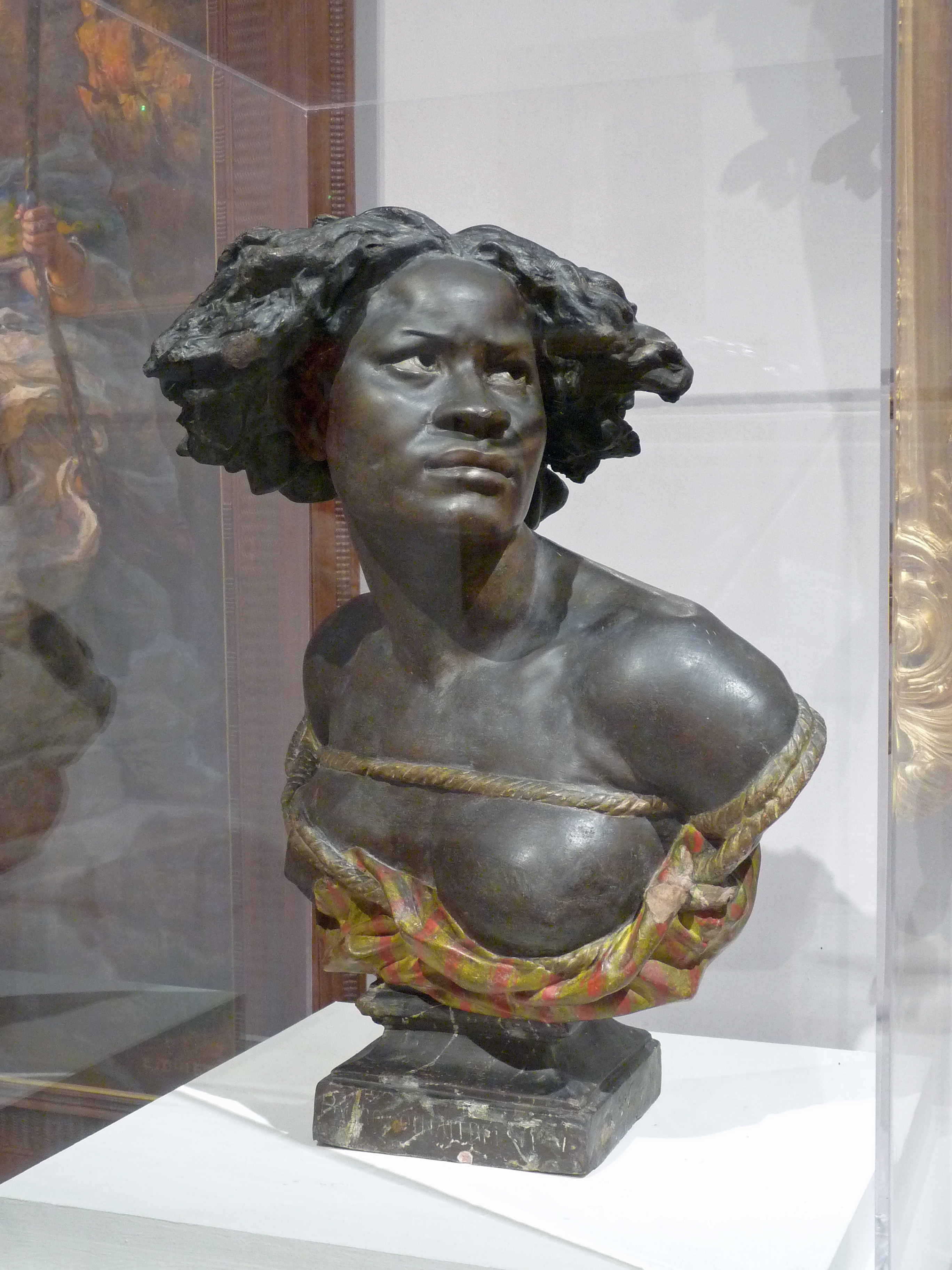 Jean-Baptiste Carpeaux : Pourquoi naître esclave ?, terre cuite, 1875 (Musée des beaux-arts de Reims)